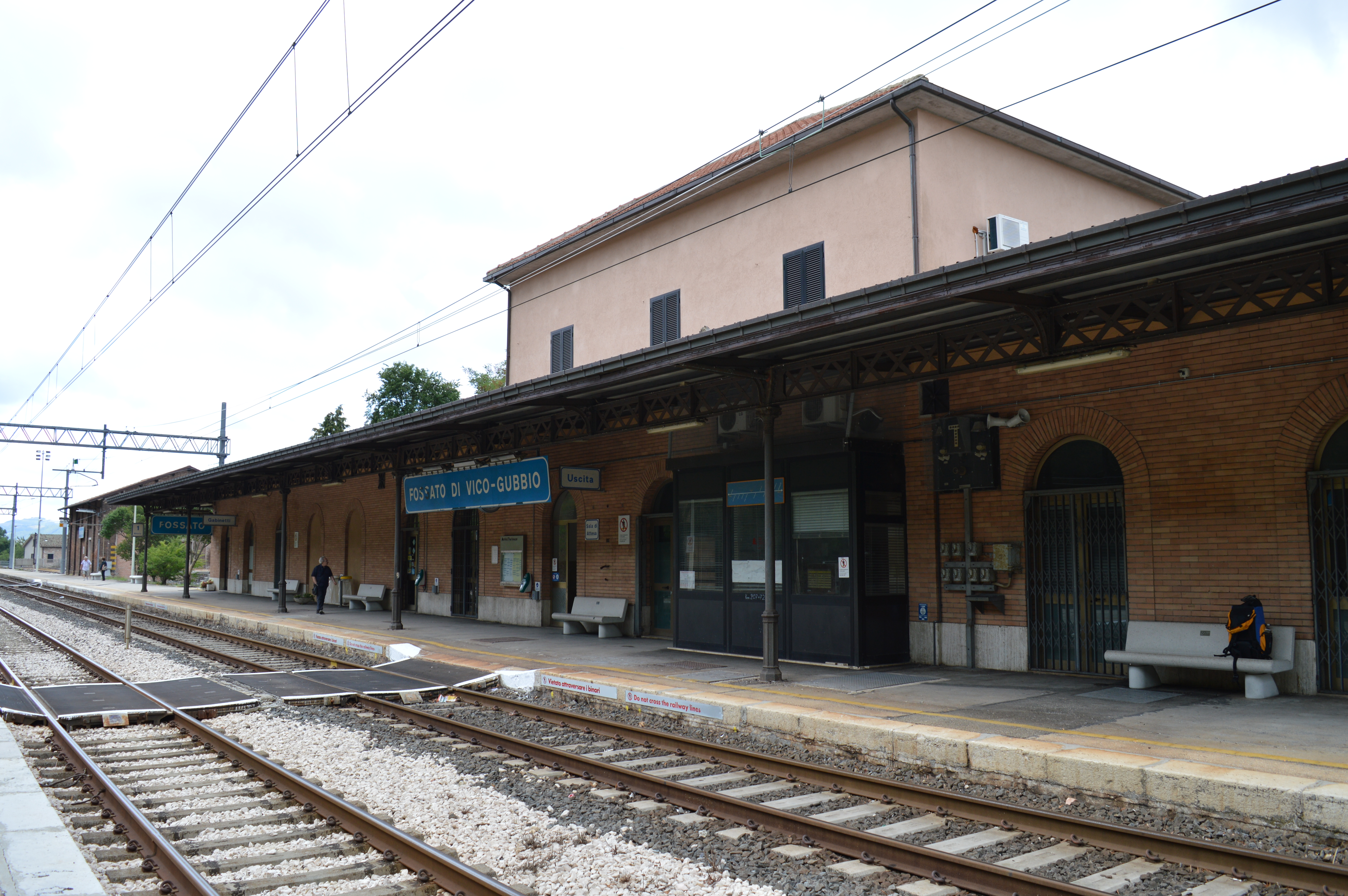 Piazzale binari e stazione di Fossato di Vico.